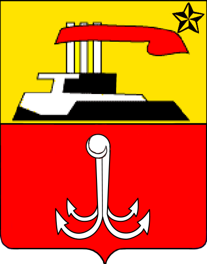 Герб Советской Одессы